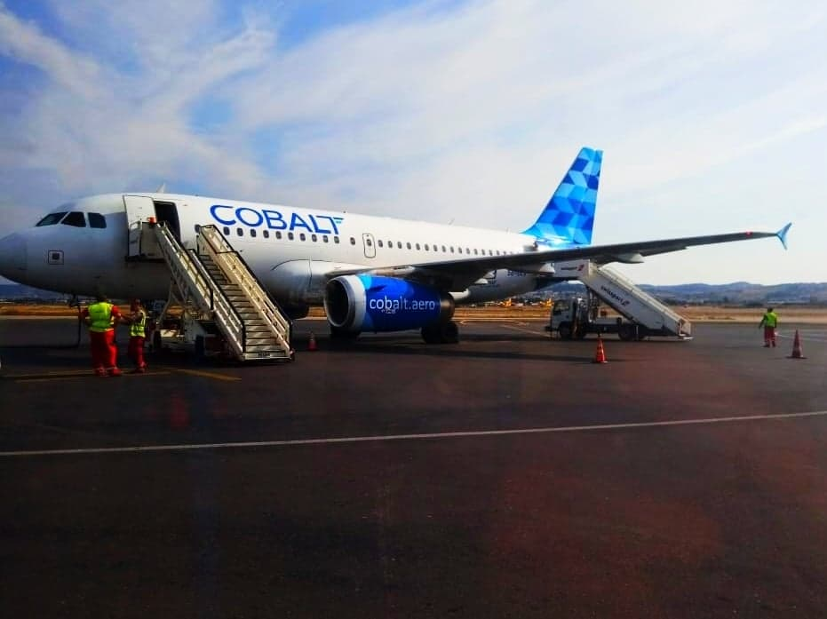 Αεροσκάφος της Cobalt στο αεροδρόμιο της Θεσσαλονίκης